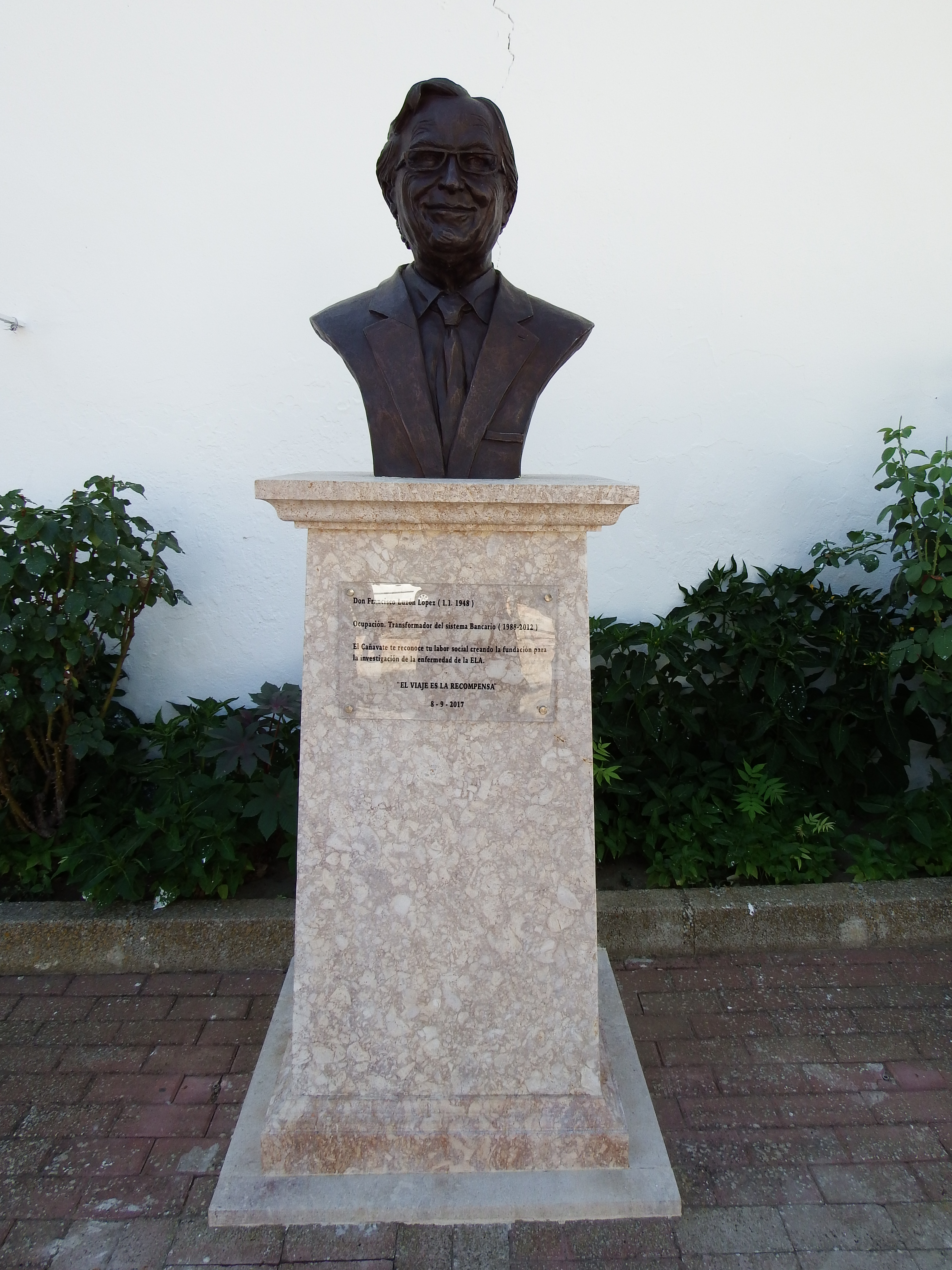 El Cañavate, monumento a Francisco Luzón López, en la plaza de la Constitución.